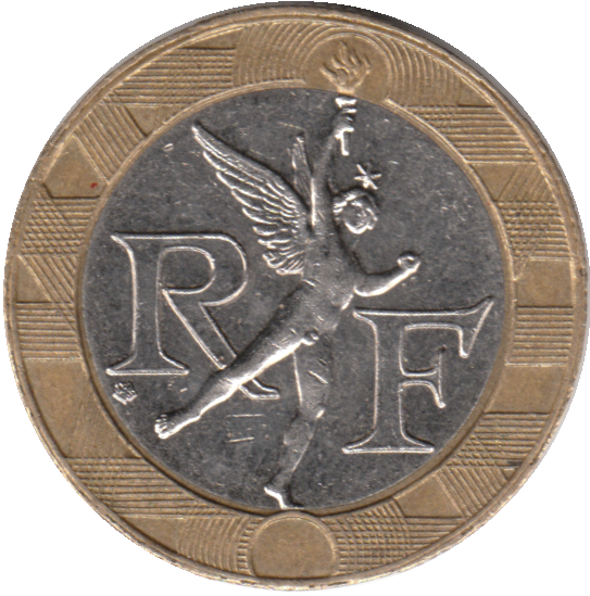 avers d'une pièce de 10 Francs génie de la Bastille de 1990